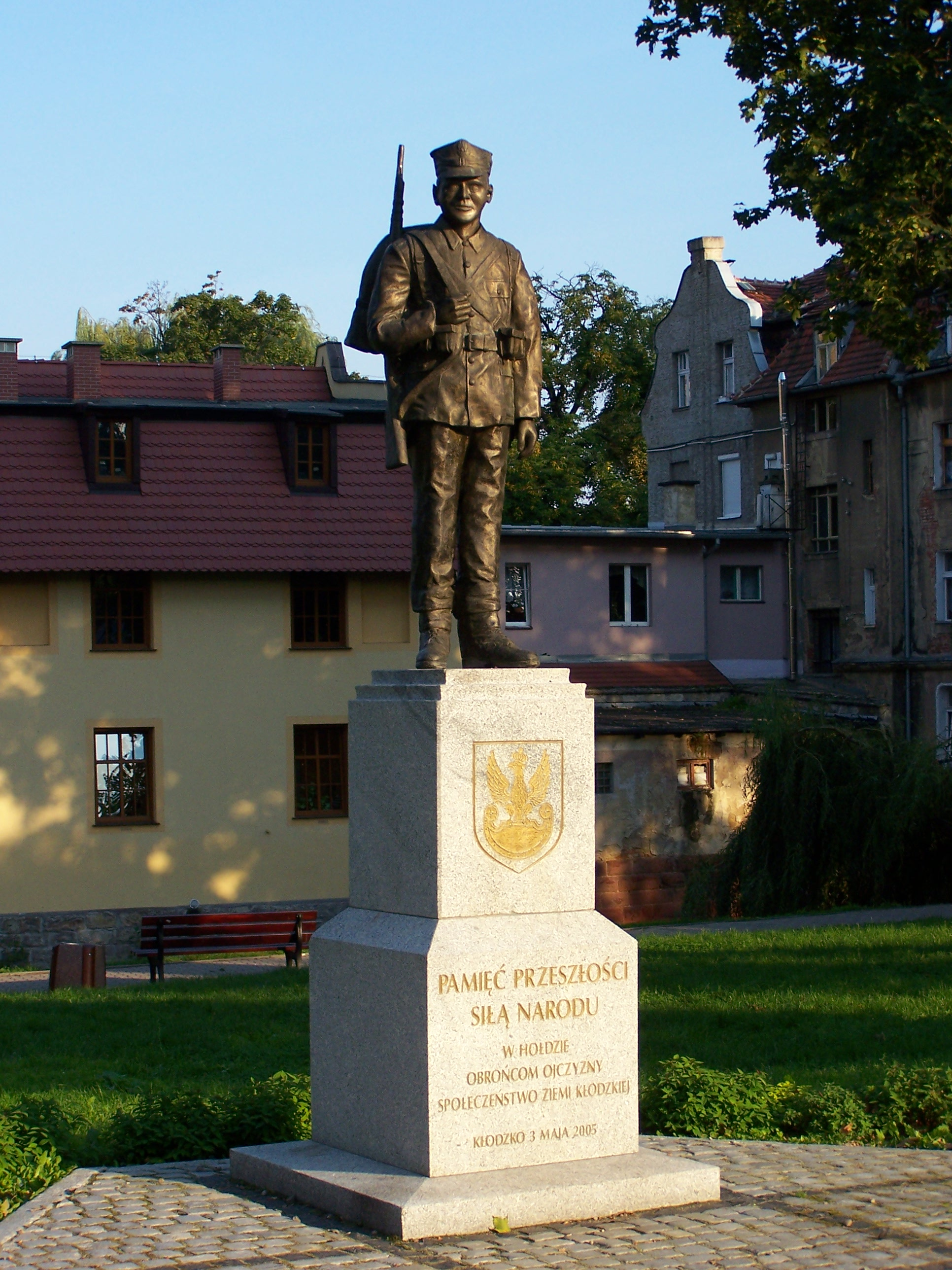 Pomnik w hołdzie obrońcom Ojczyzny w Kłodzku.